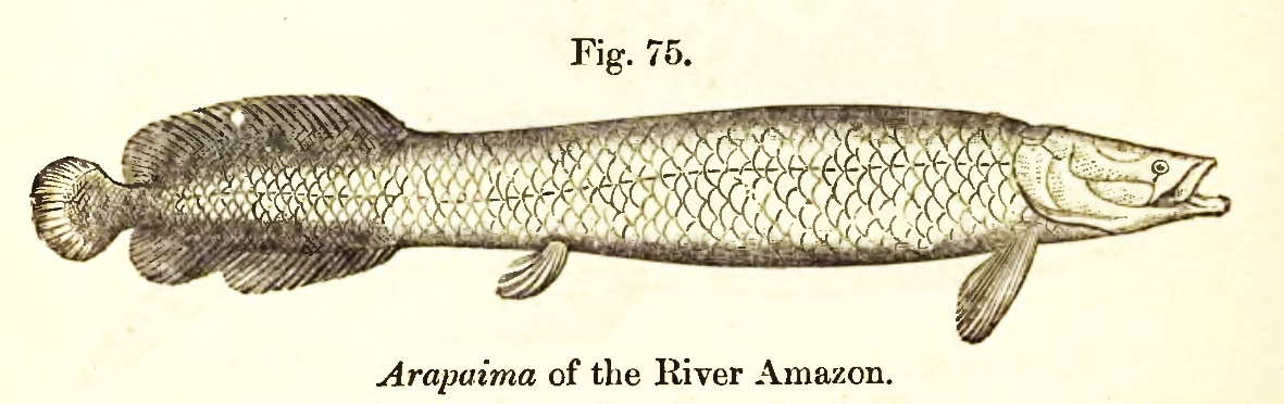 Arapaima